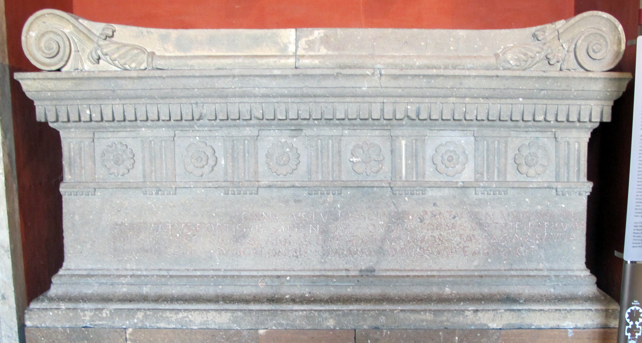 Musei Vaticani